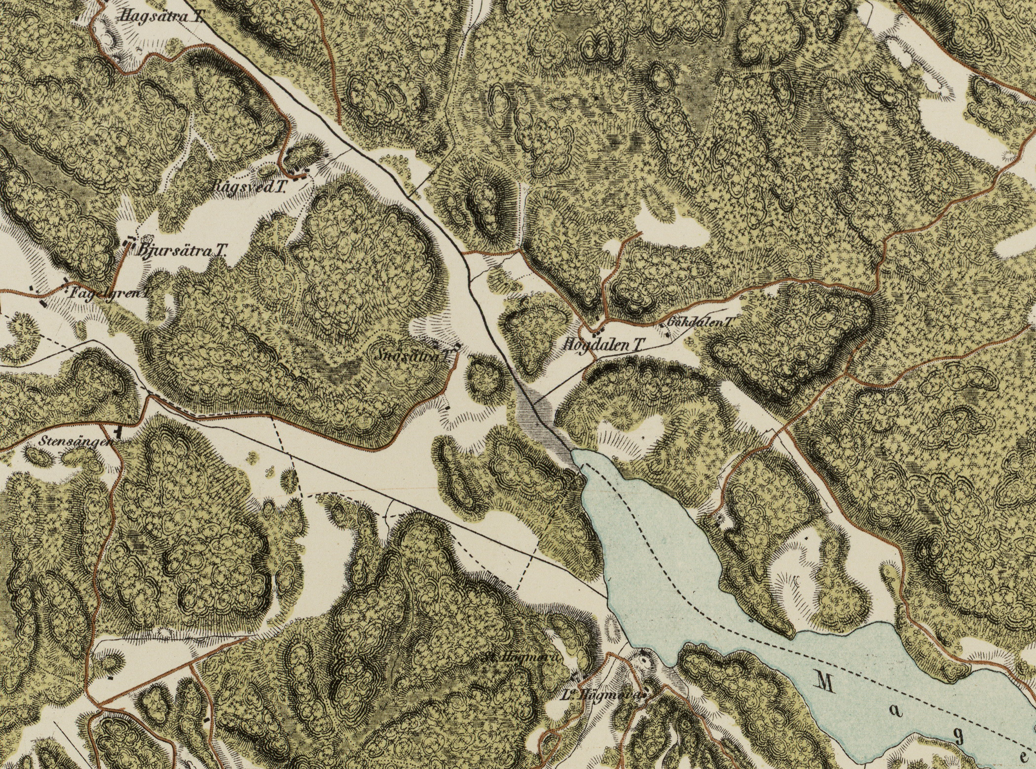 Detalj visande Rågsved, Snösätra, Högdalen mm